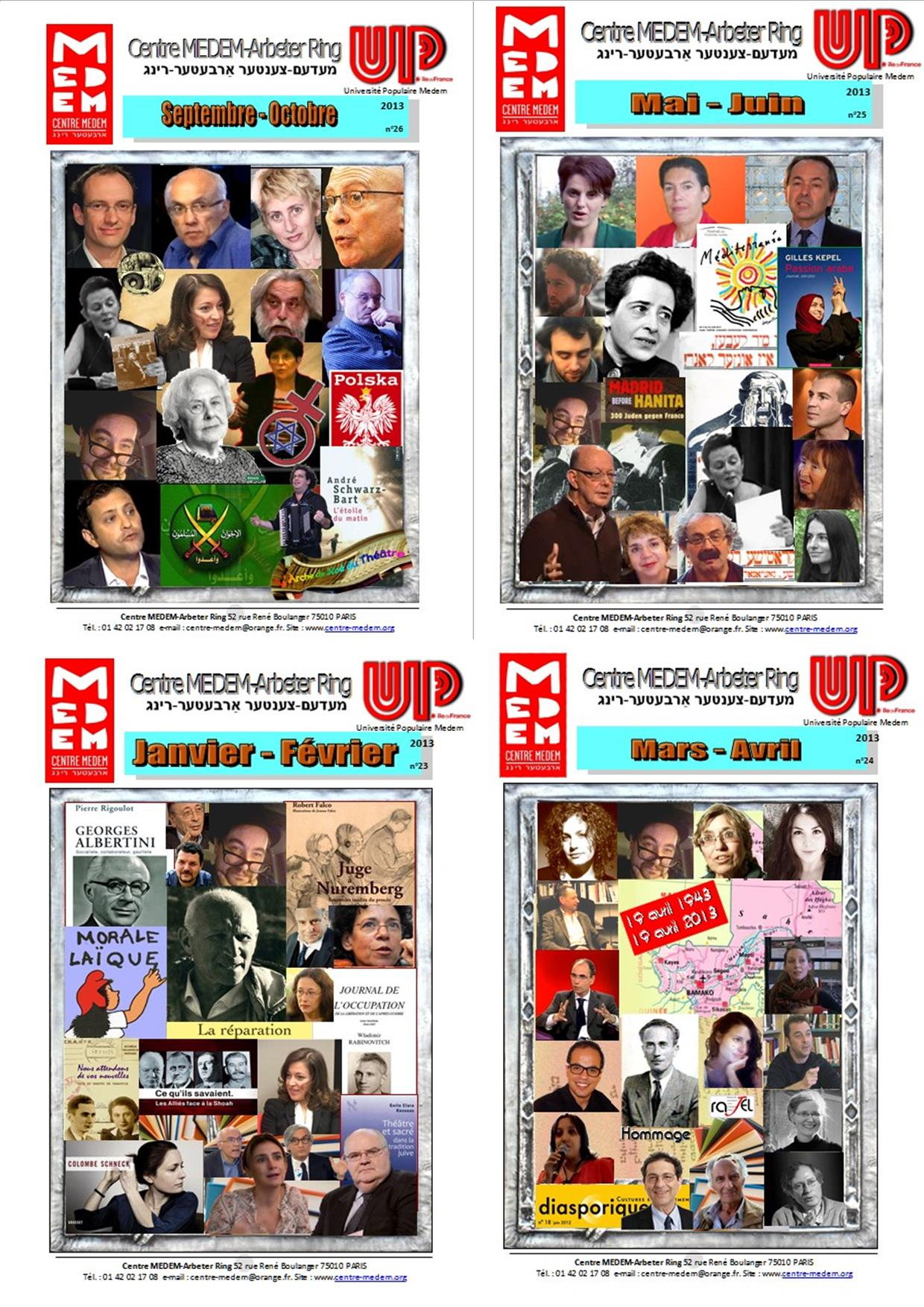 Programmes bimestriels du Centre Medem Arbeter Ring